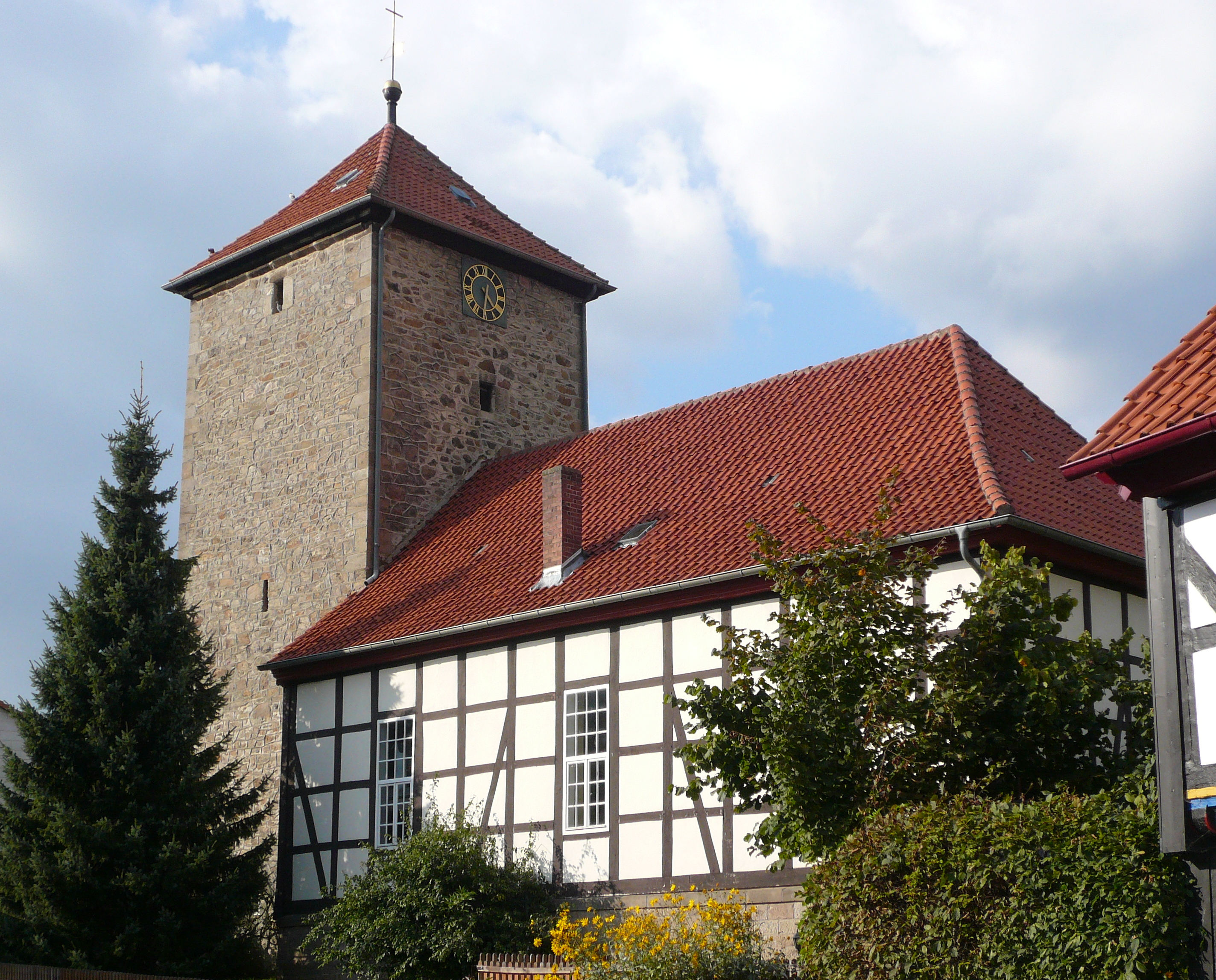 Kirche St. Nicolai in Eberhausen, Gemeinde Adelebsen, Niedersachsen. Turm mittelalterlich, Langhaus 1841.